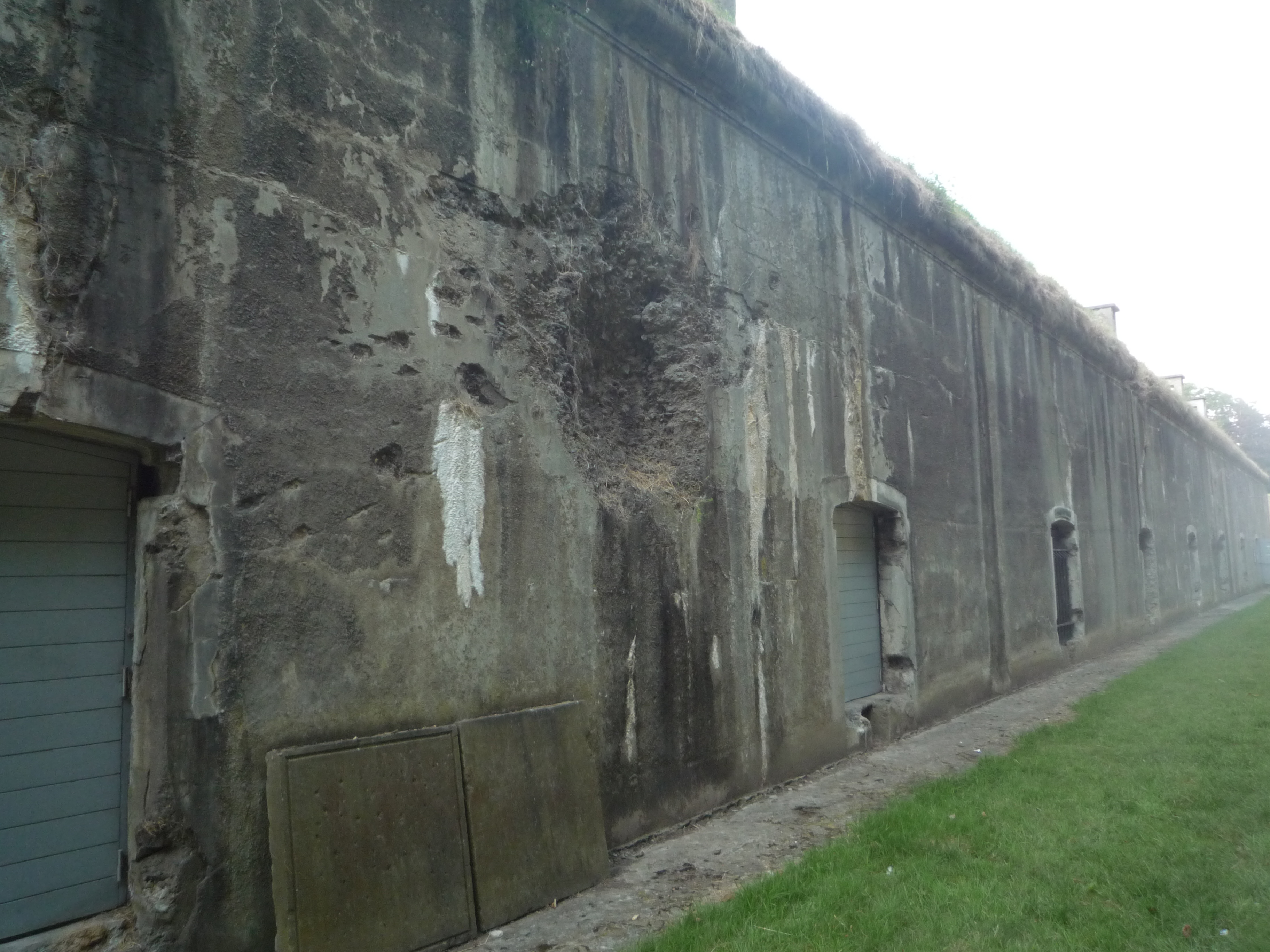 Fort de Loncin,rue des Héros, 17